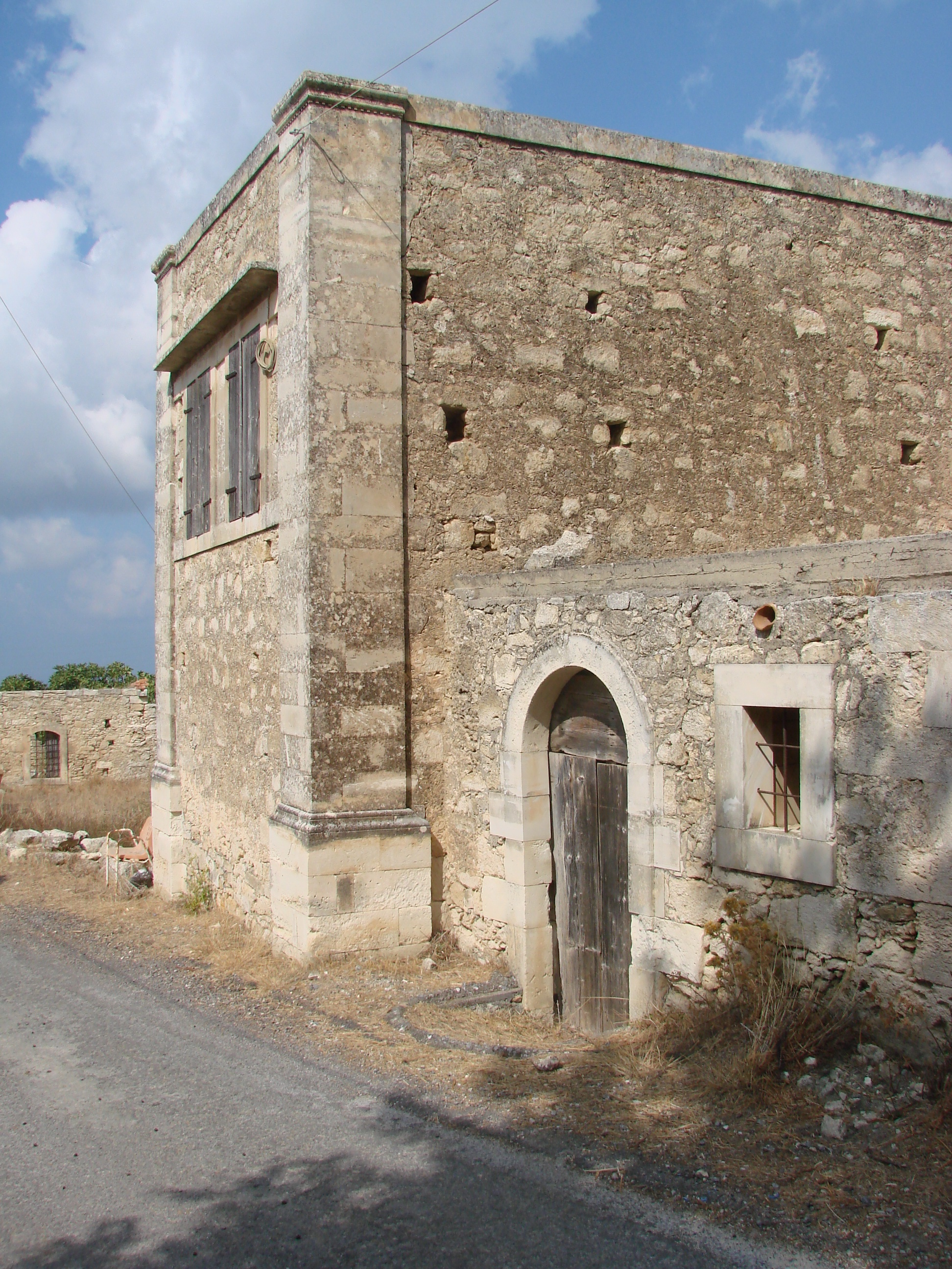 Κτηριακό συγκρότημα Νικολακάκη στο Τριπόδο Μυλοποτάμου«Κτηριακό συγκρότημα Νικολακάκη στο Τριπόδο Μυλοποτάμου»